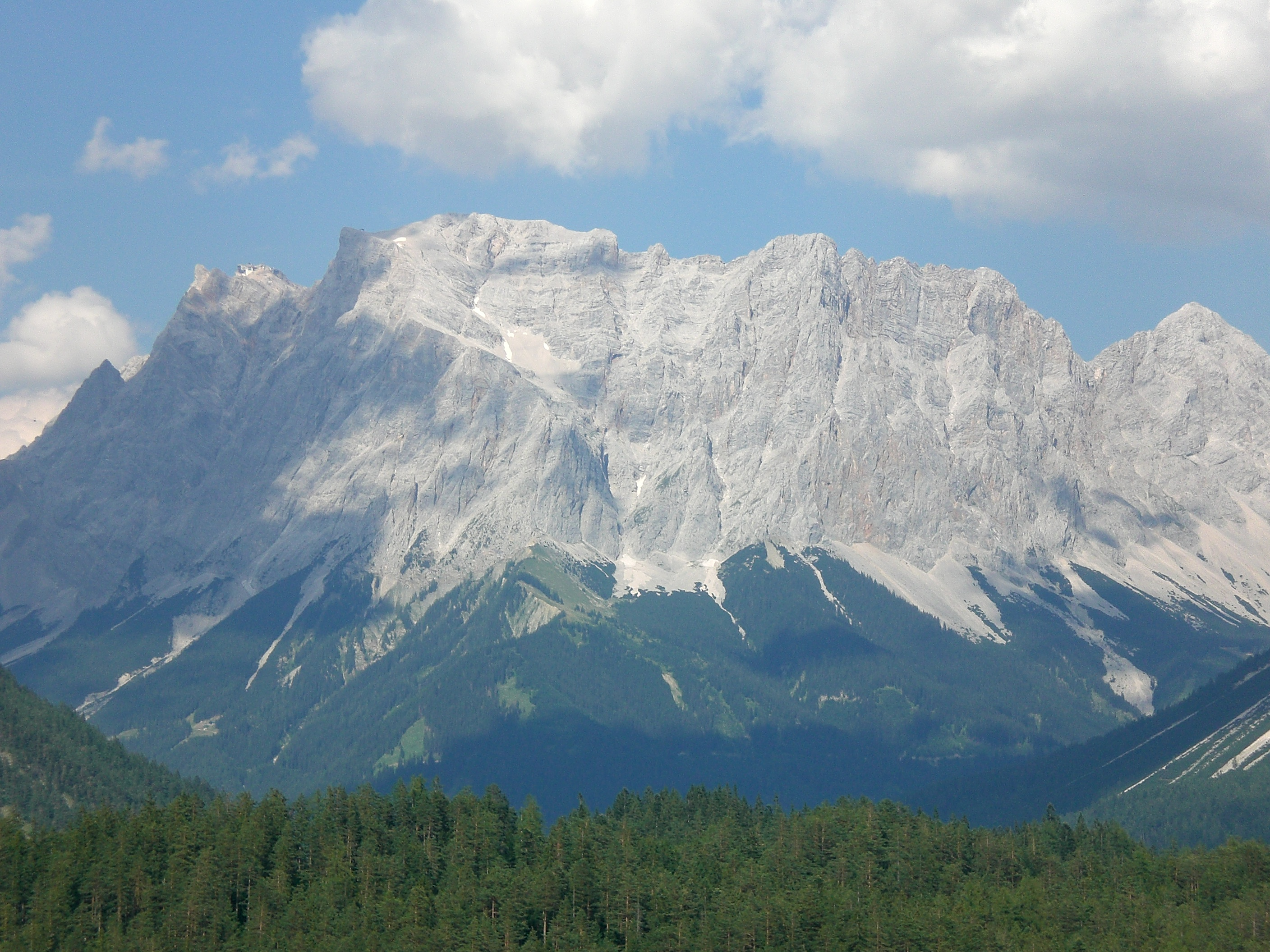 Schneefernerkopf (vom Fernpass aus)